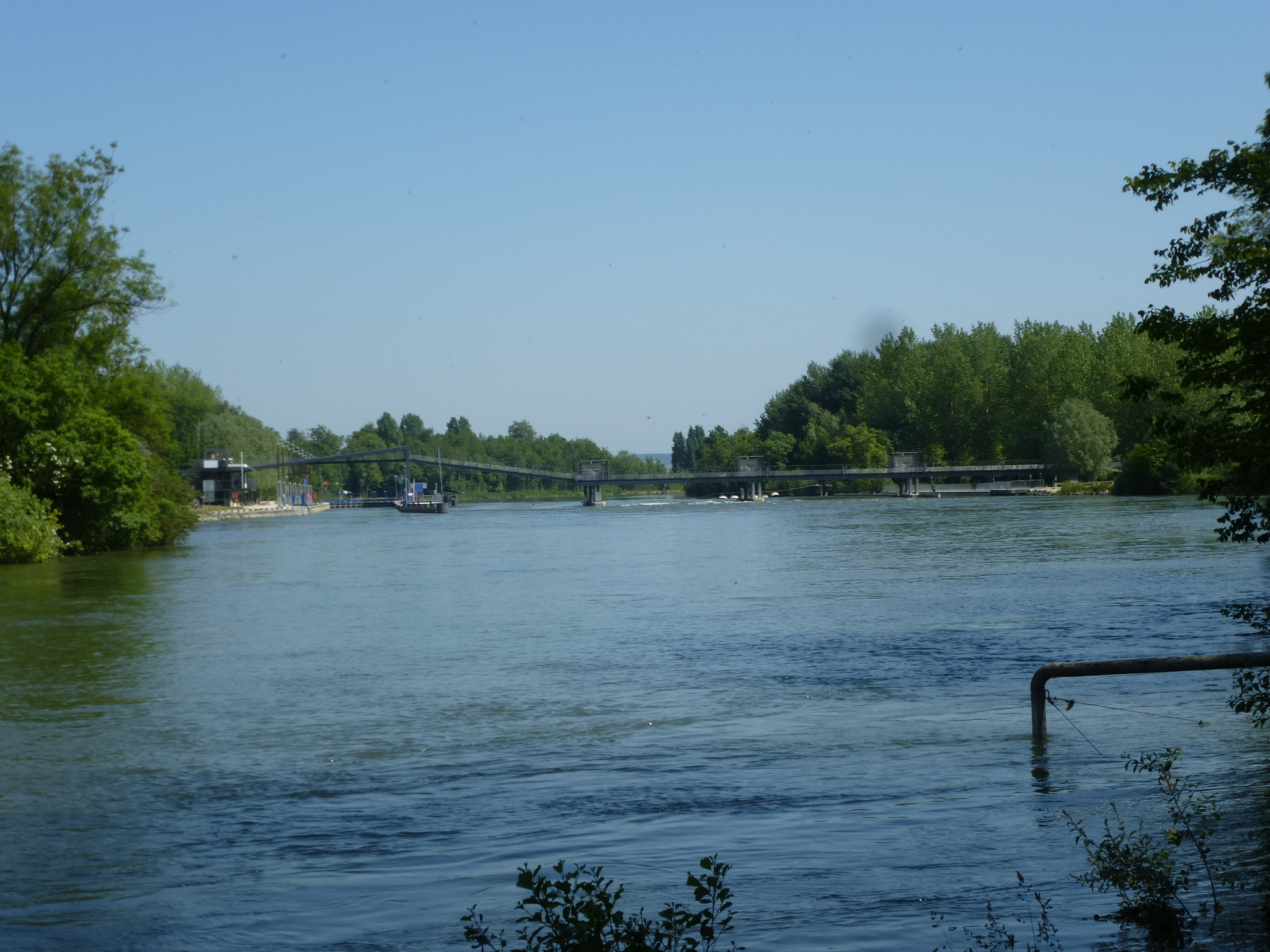 Barrage de Jaulnes sur la Seine (passerelle, écluse). (département de la Seine-et-Marne, région Île-de-France).